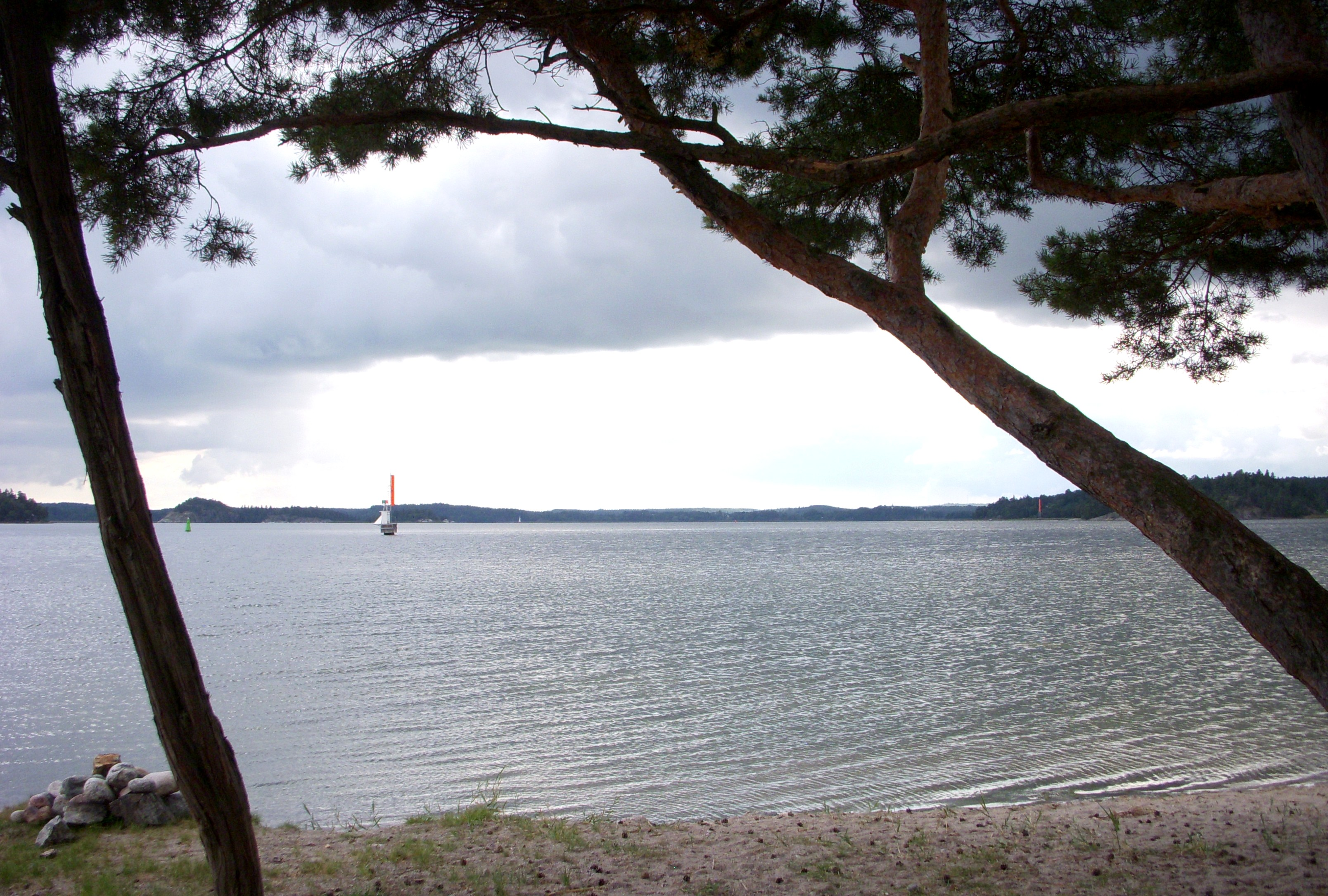 Järnafjärden, vy från Brandalsund